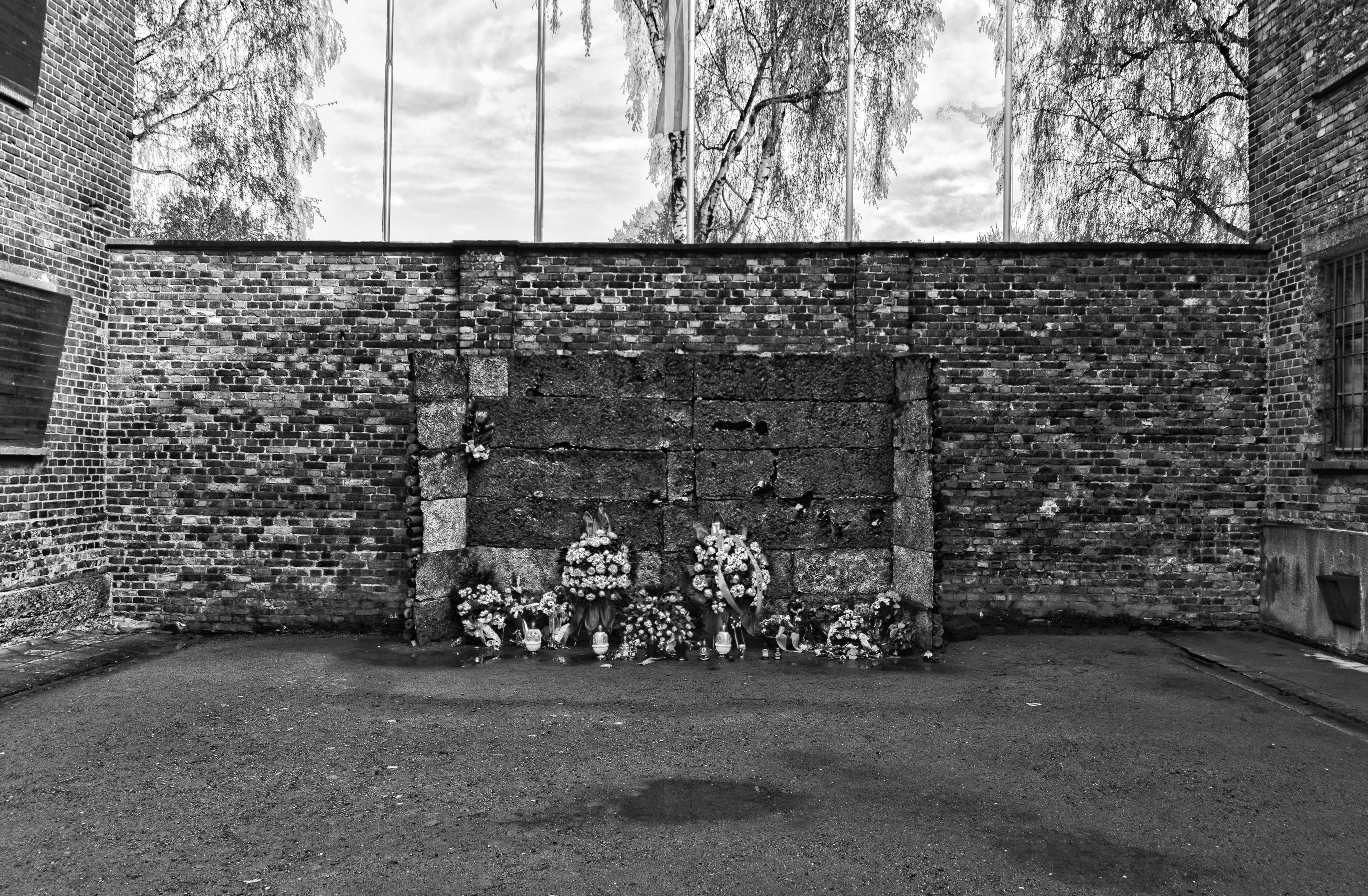 Auschwitz i april 2014.